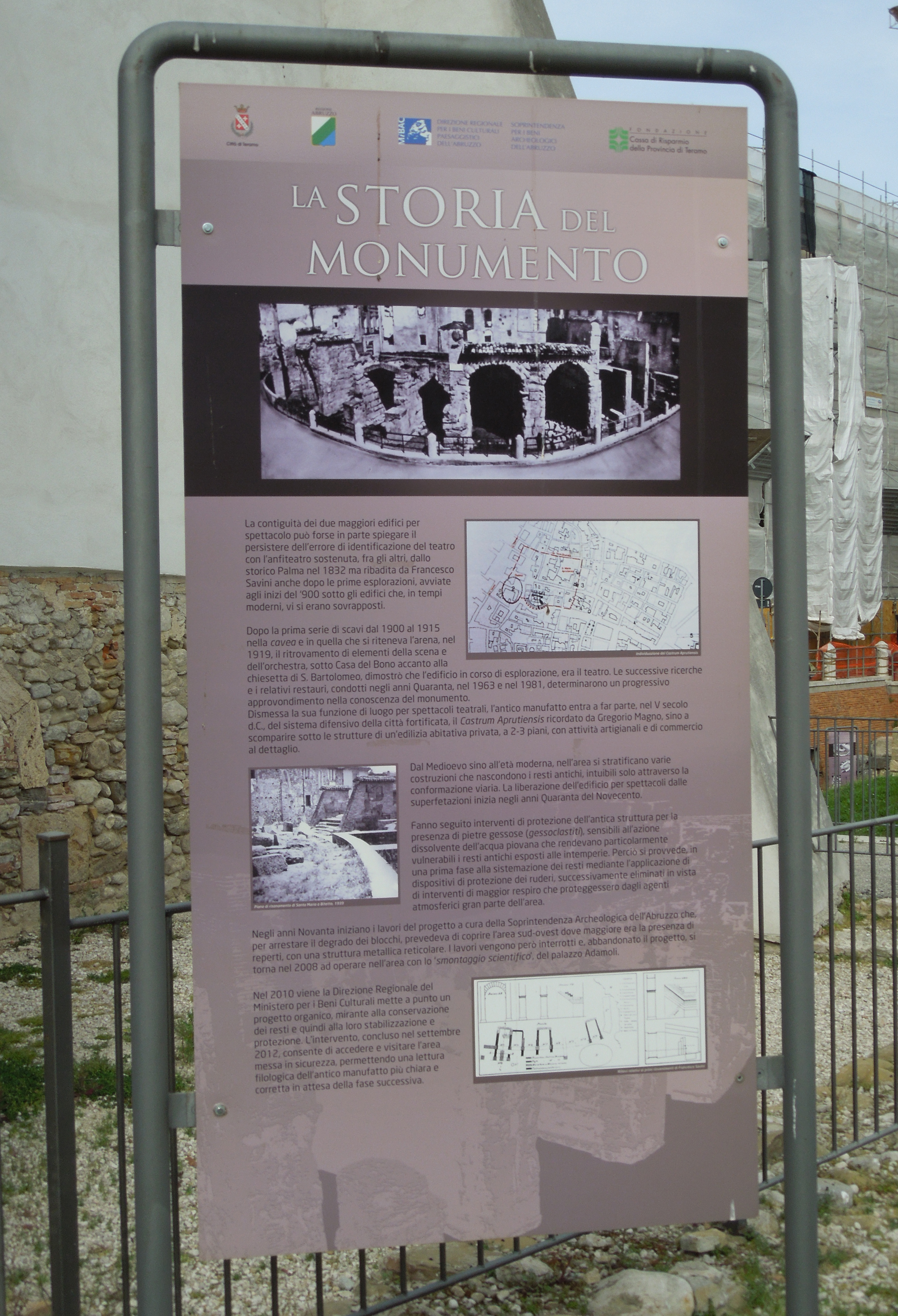 Pannello informativo sulla storia del monumento all'interno del sito archeologico del Teatro romano di Teramo.